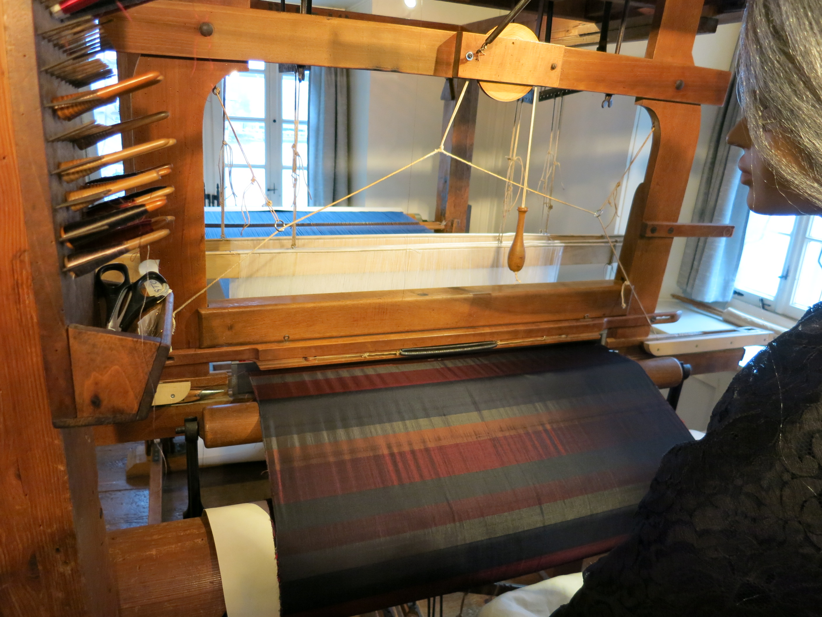 Ortsmuseum Sust Horgen ZH, Schweiz